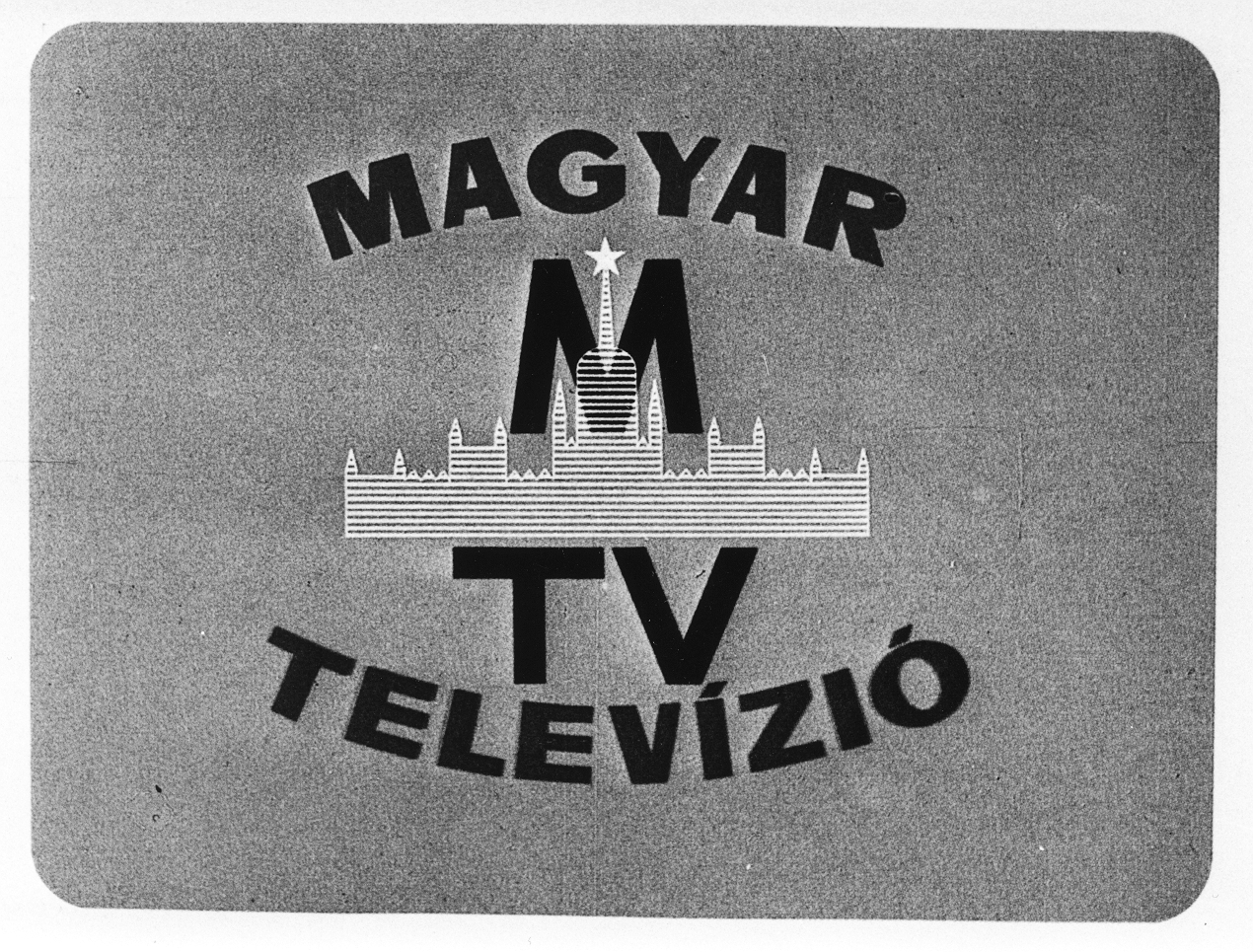 A Magyar Televízió emblémája 1961-1969 között.